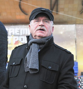 Сергей Никоненко на премьере фильма “Обитаемый остров: СХВАТКА” 6 мая 2009 года